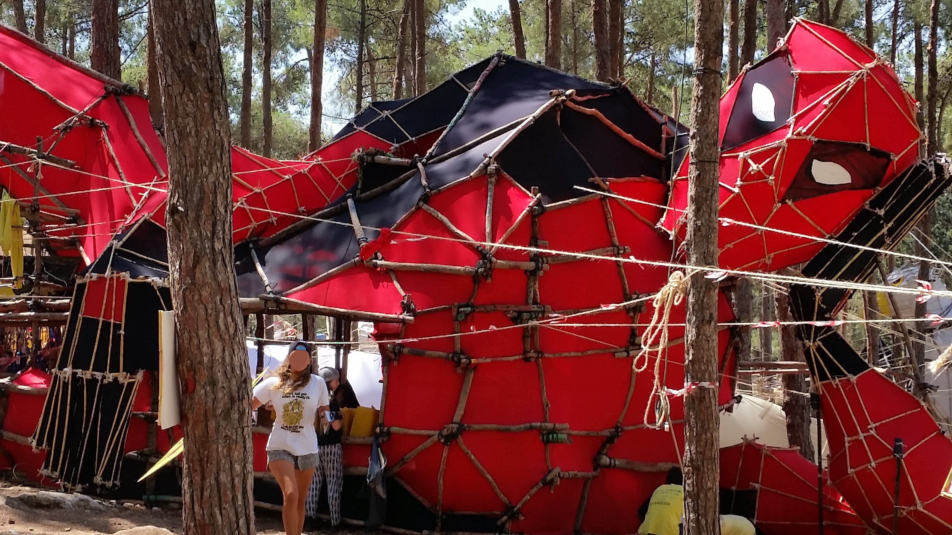 מבנה בצורת דמות דדפול שנבנה במחנה קיץ של תנועת הצופים בישראל, יער הזורע, קיץ 2016